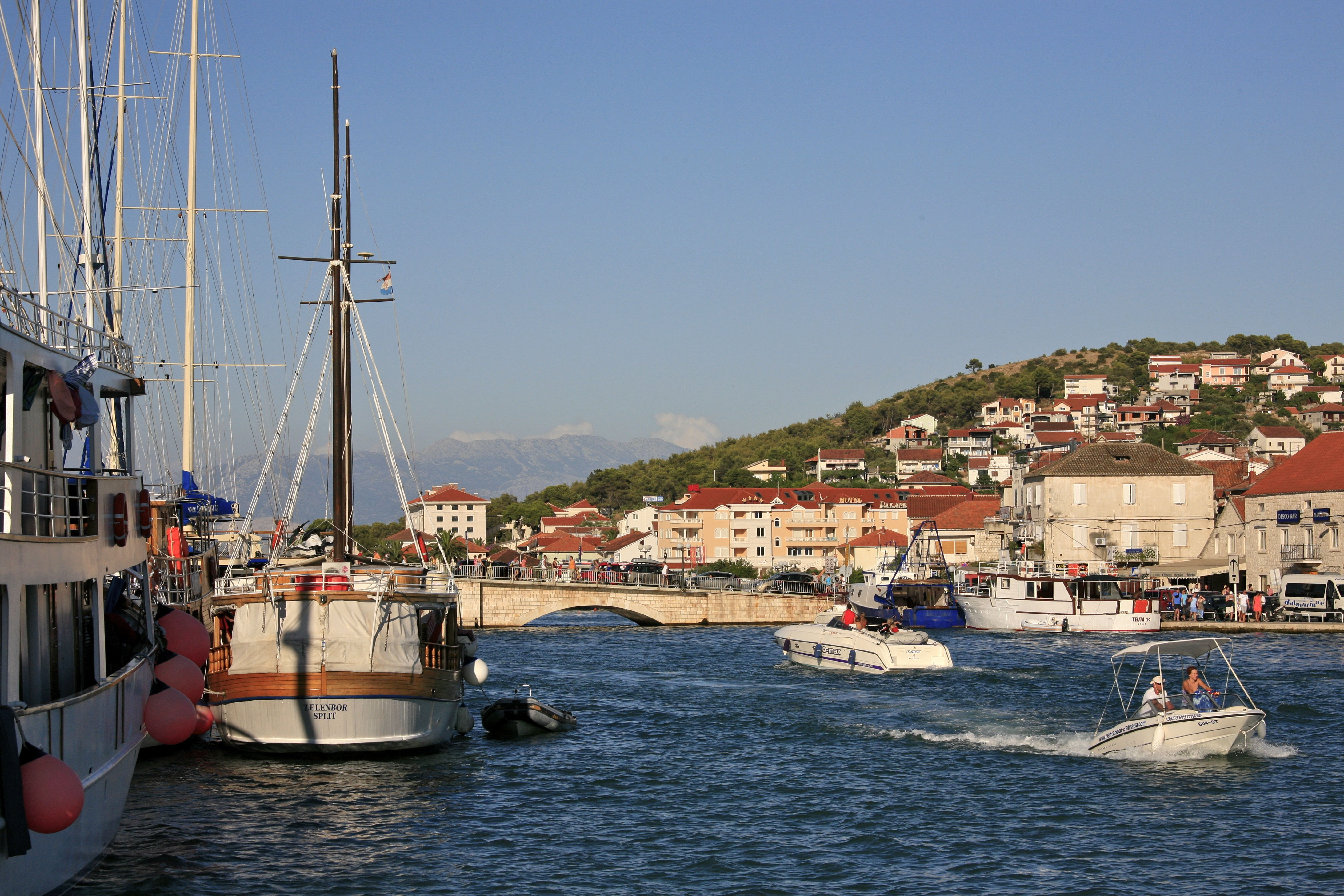 Afternoon in Trogir